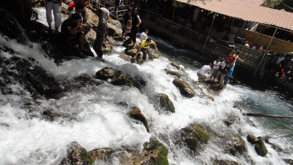 لقطة لمصيف بيخال يوم 6 تموز 2012 من تصوير